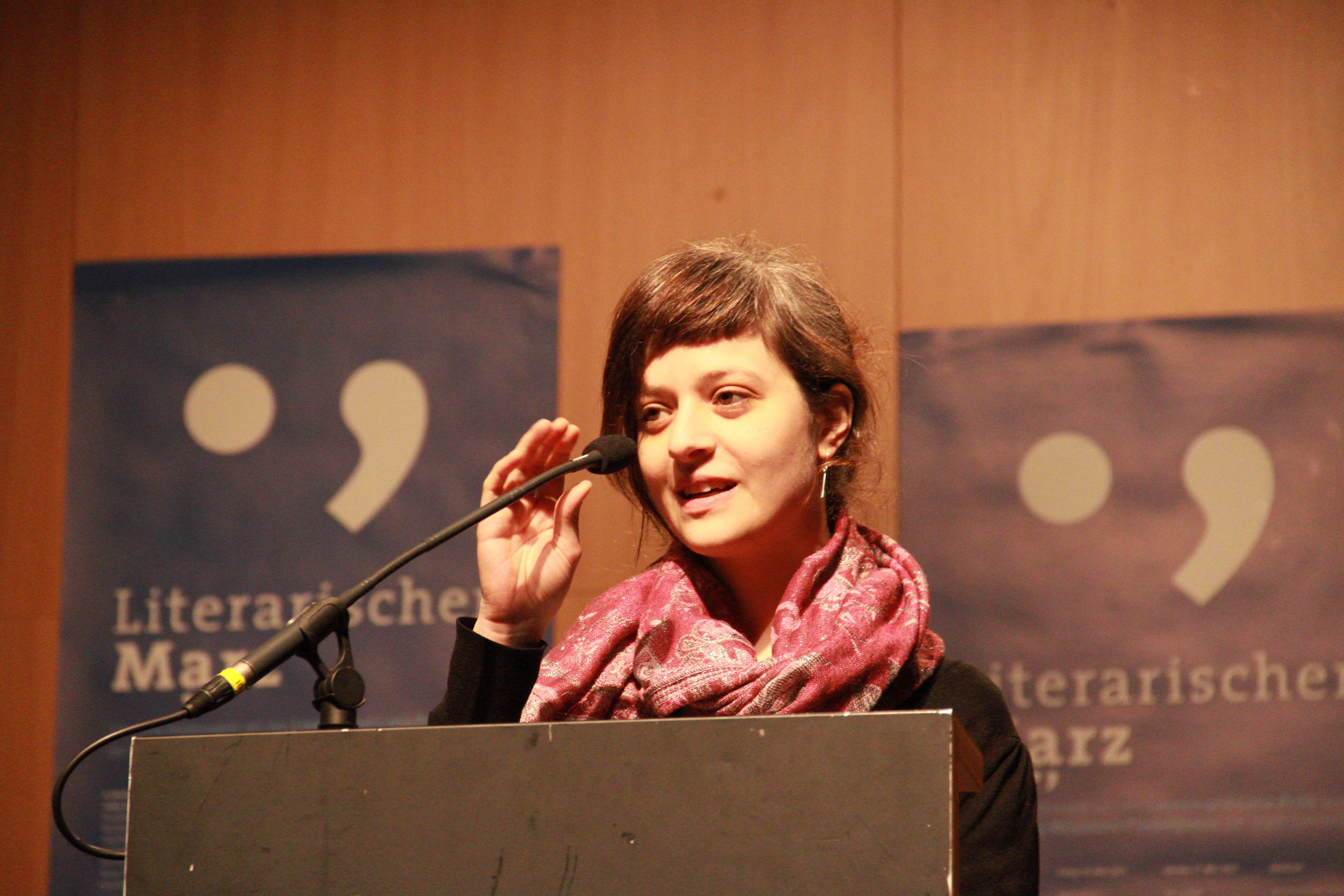 Verleihung des Wolfgang-Weyrauch-Fördeerpreises an Özlem Özgül Dündar